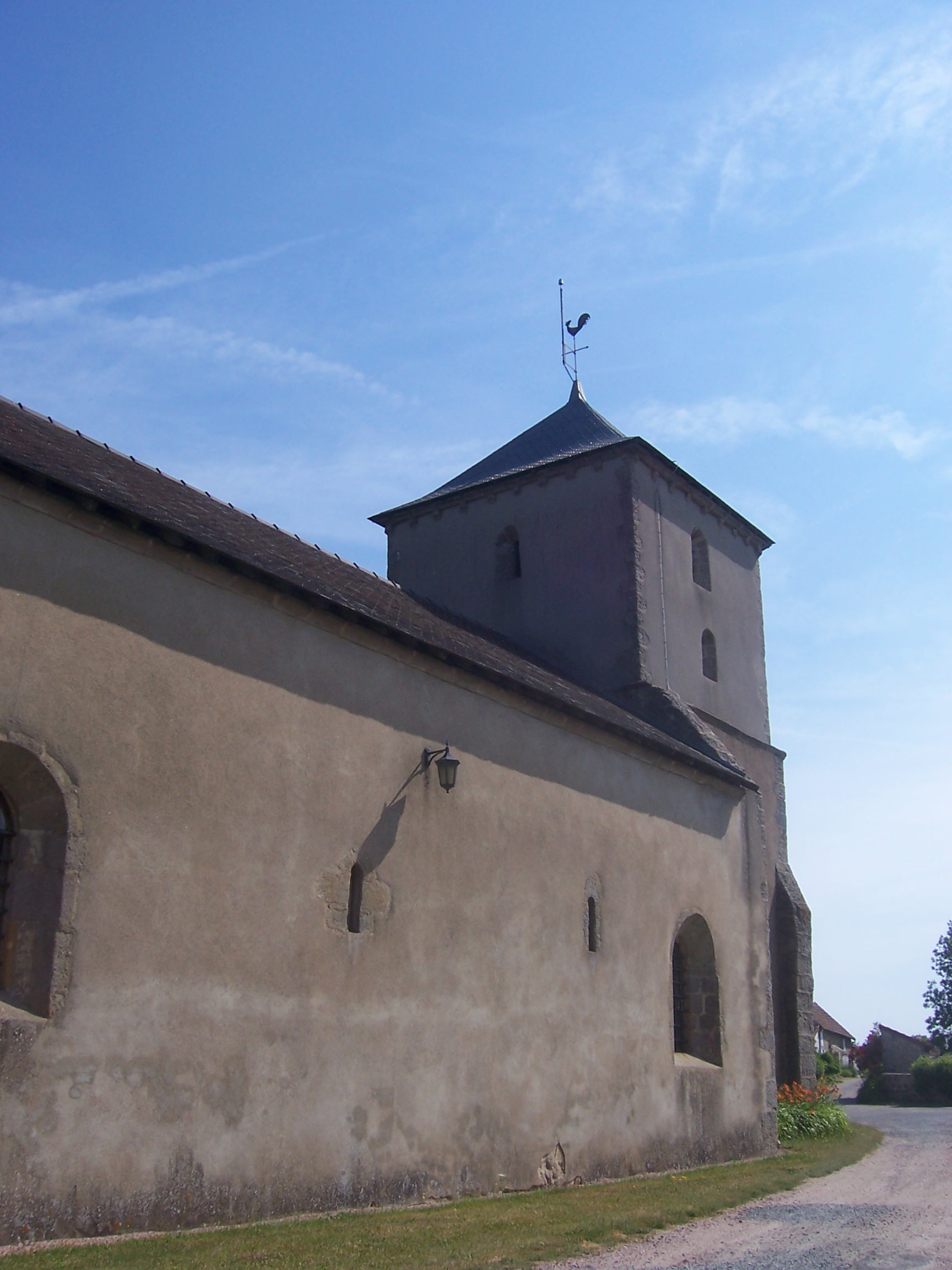 Eglise de Charbonnat